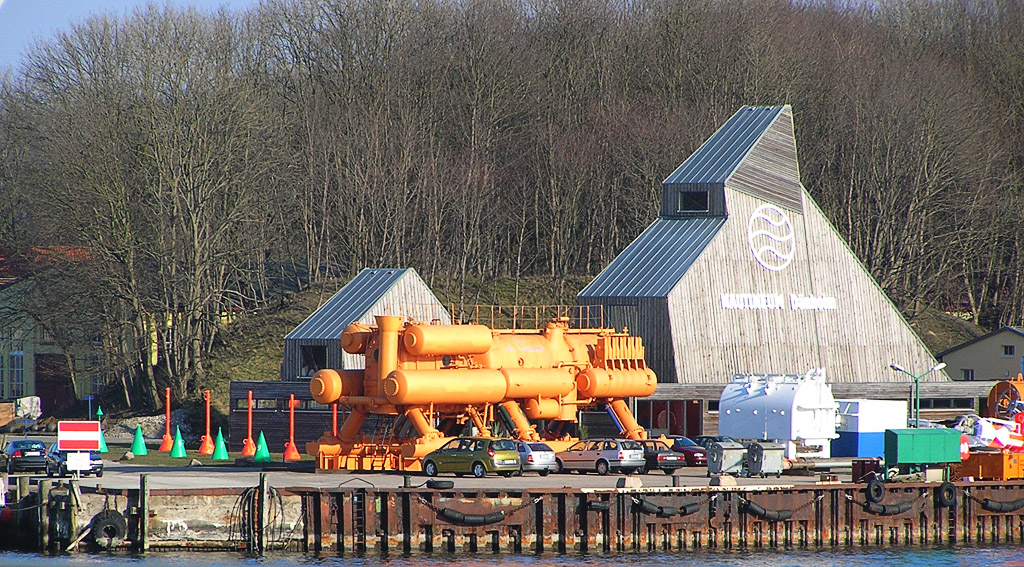 Beschreibung: Das Nautineum auf dem Dänholm von der Ziegelgrabenbrücke aus gesehen. Fotograf: Darkone, 1. April 2005